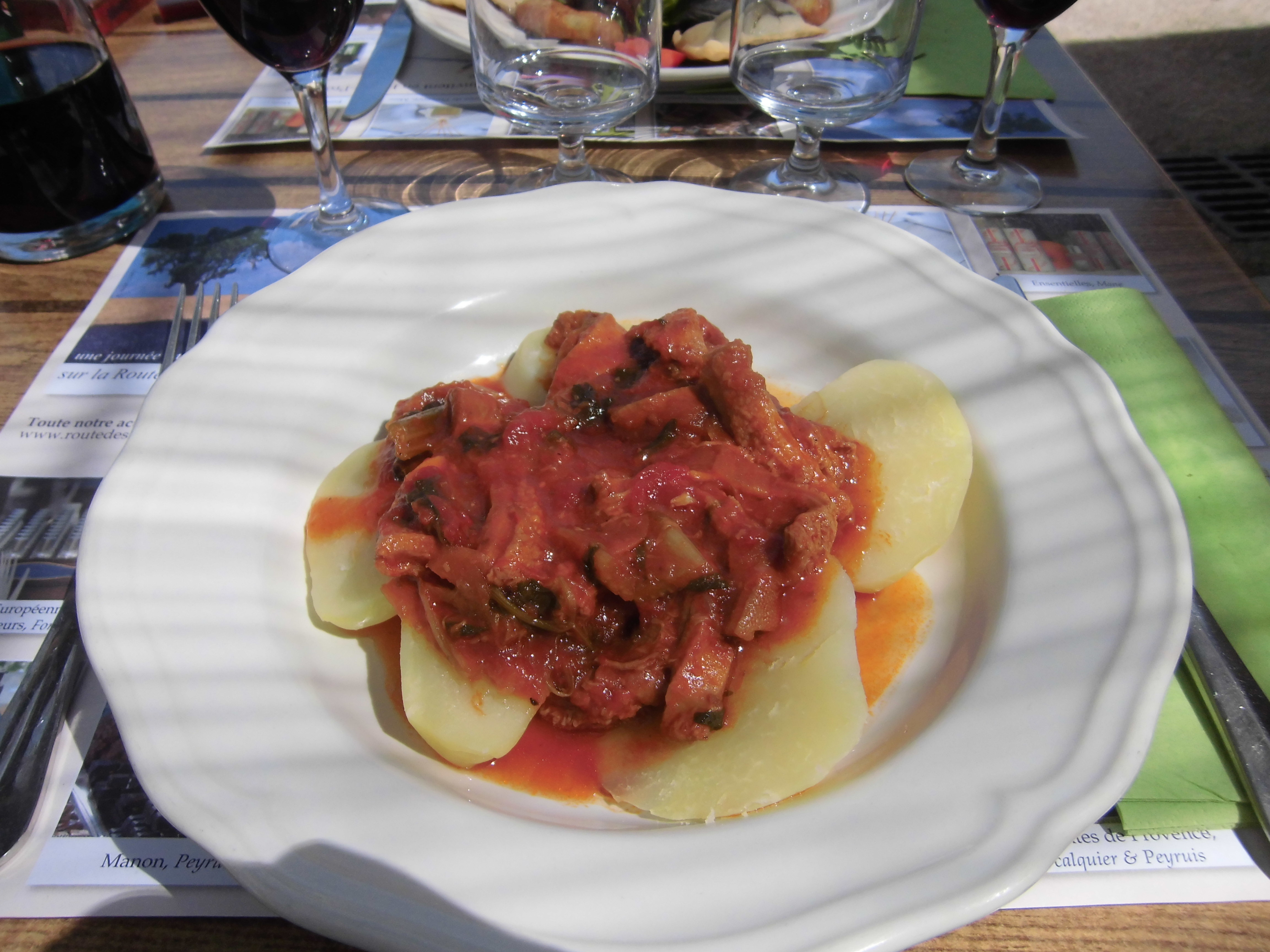 tripe à la provençal au Bistrot de Pays de Niozelles